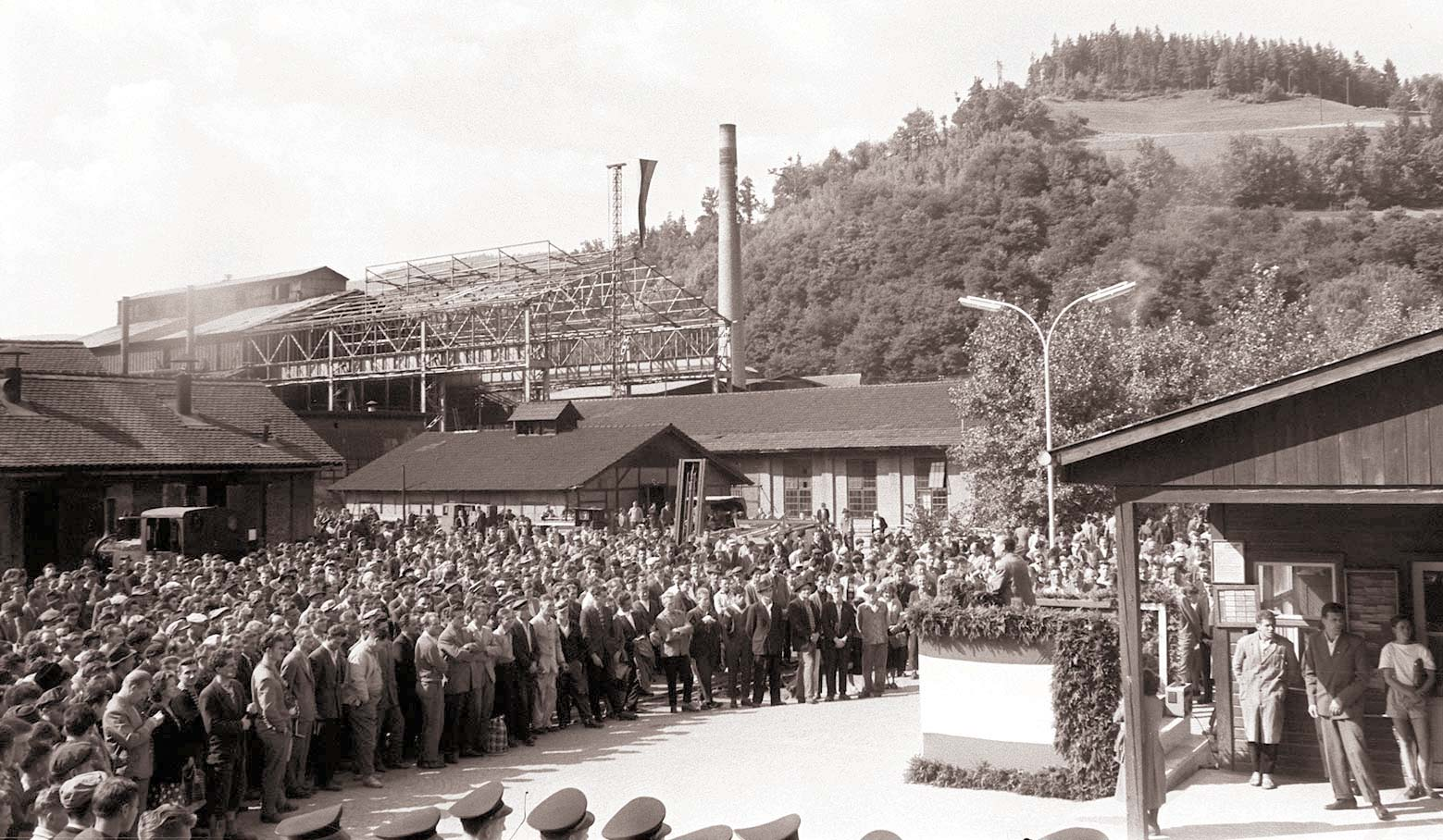 10. obletnica delavskega samoupravljanja ravenske železarne